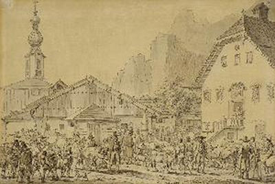 Der Viehmarkt in St. Gilgen